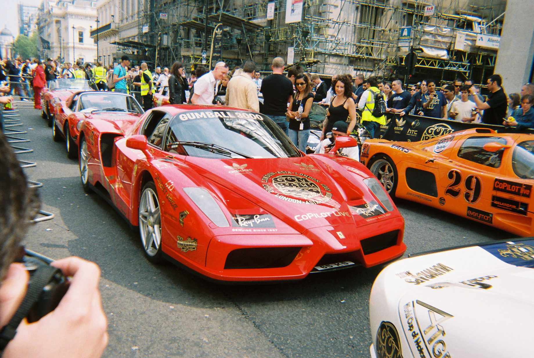 Ferrari Enzo - Gumball 3000 2007